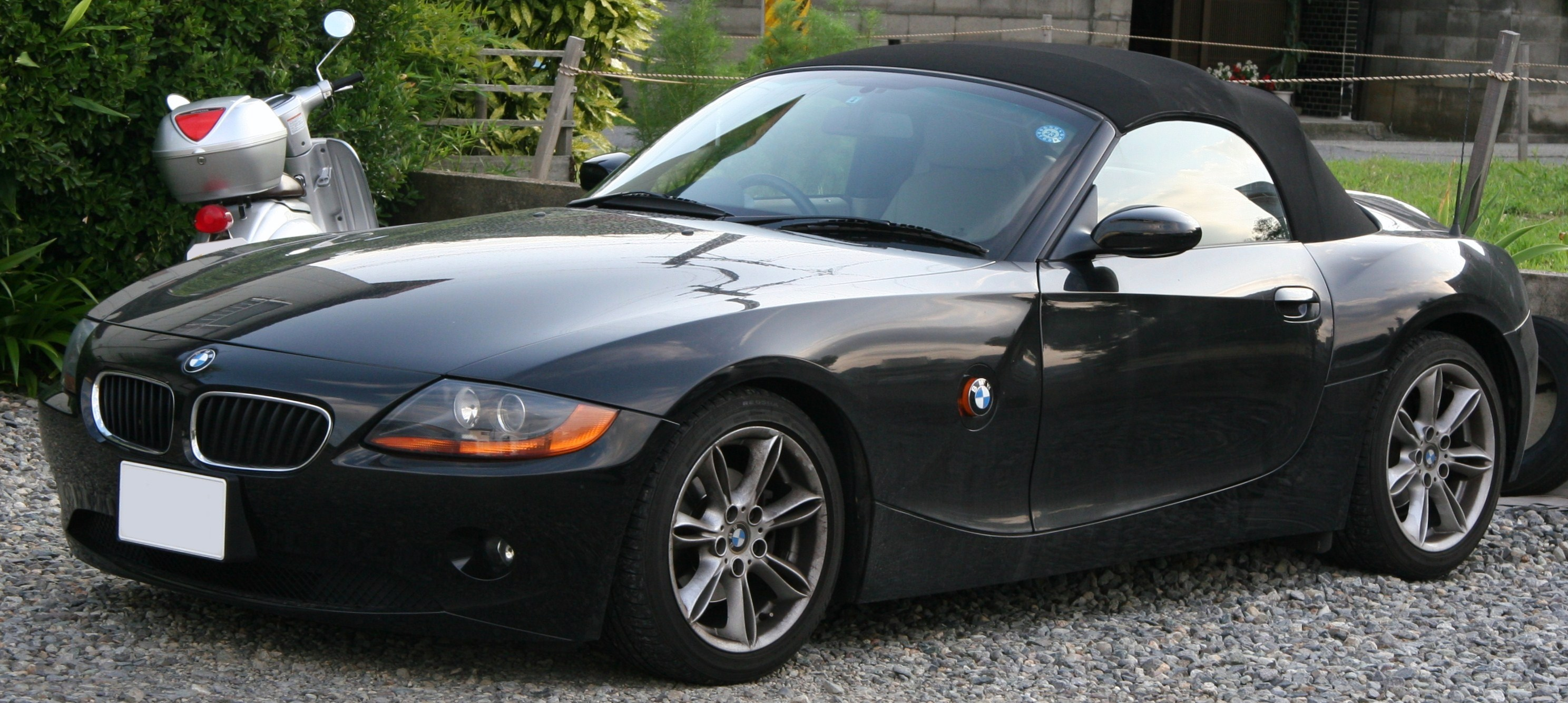 BMW Z4